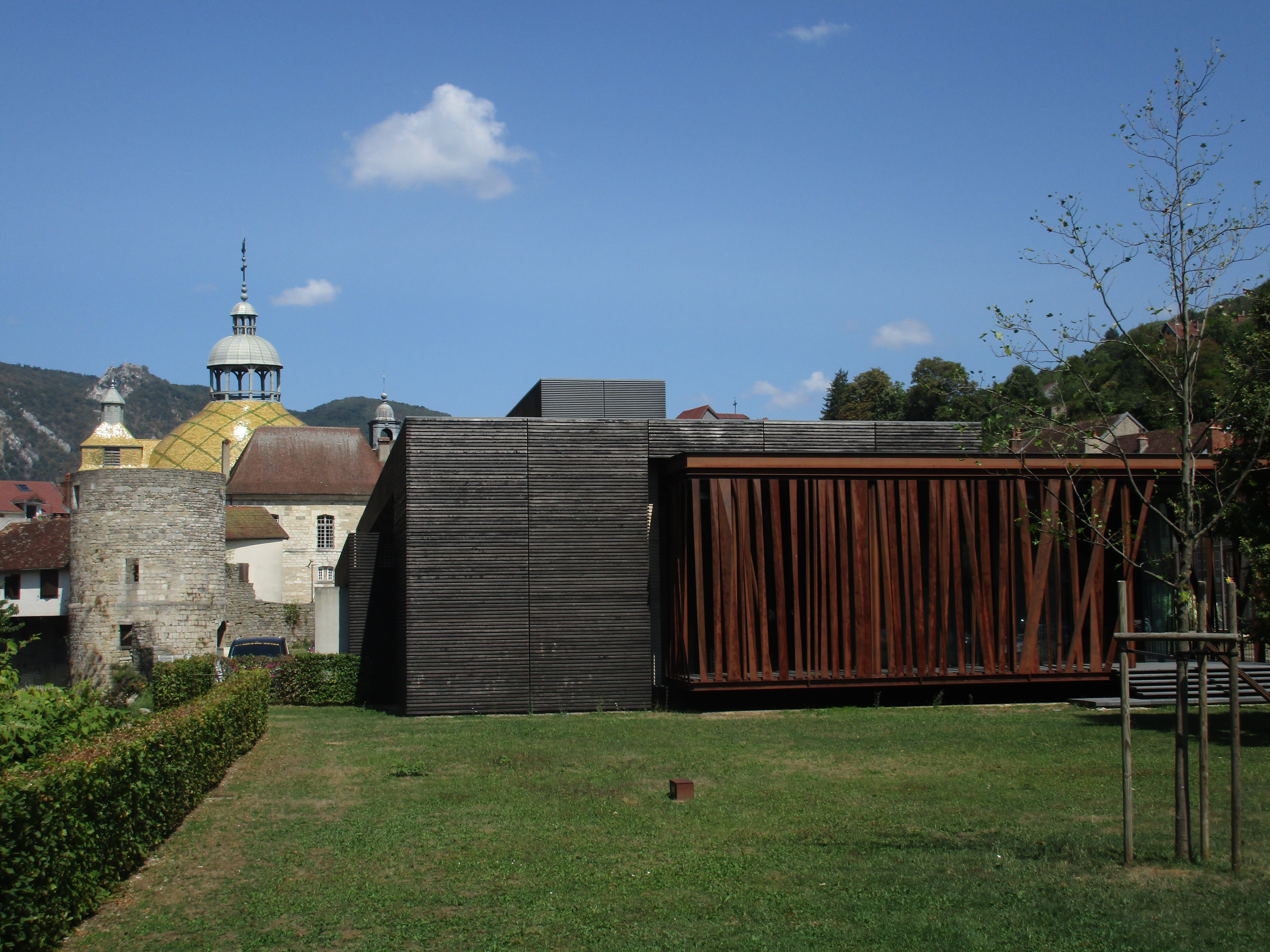 Das neue Casino von Salins-les-Bains, im Hintergrund die Chapelle Notre Dame Libératrice